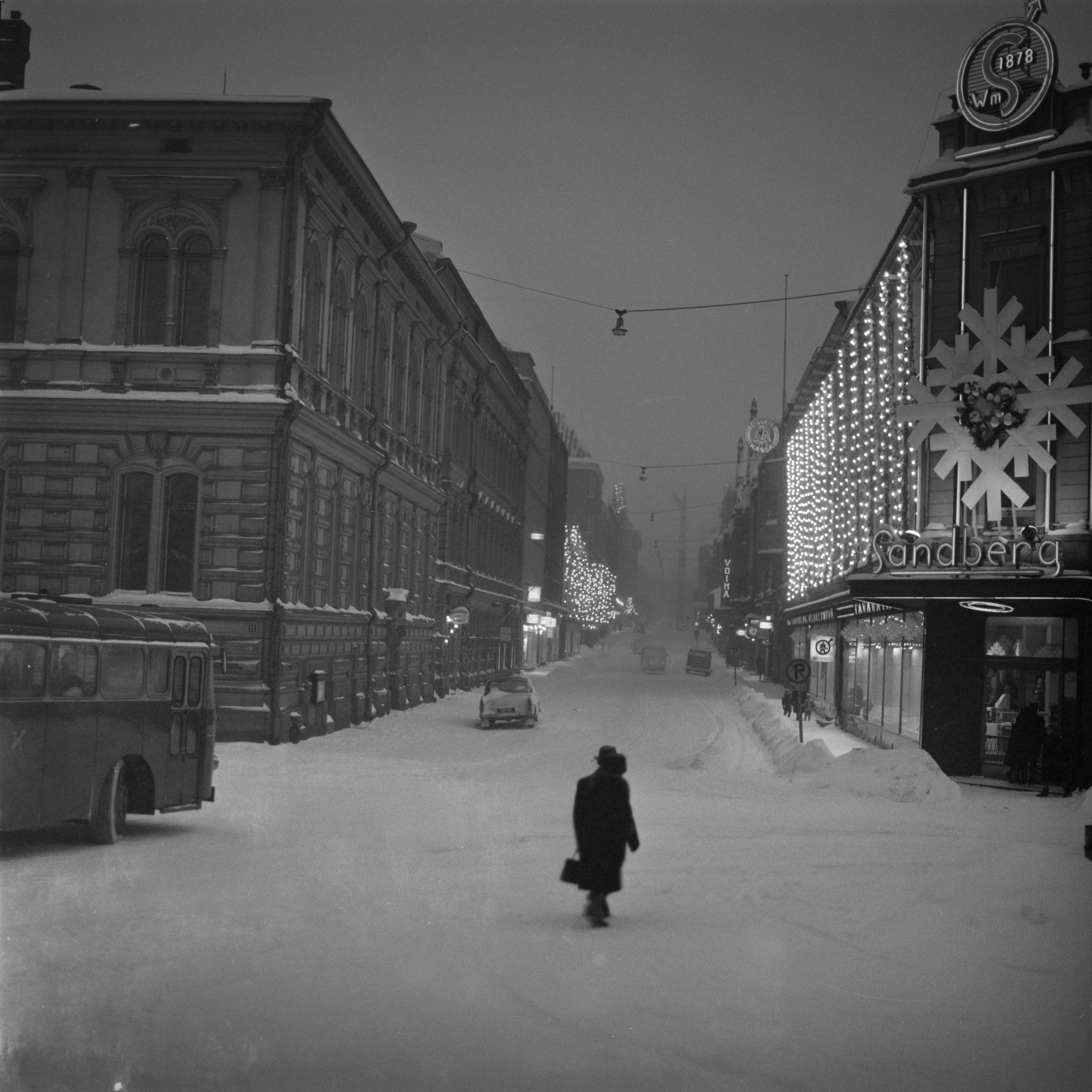 Valokuva on otettu Tampereen Keskustorilta kohti Kauppakatua. Vasemmalla on Raatihuoneen kulma, oikealla Sandbergin tavaratalo.